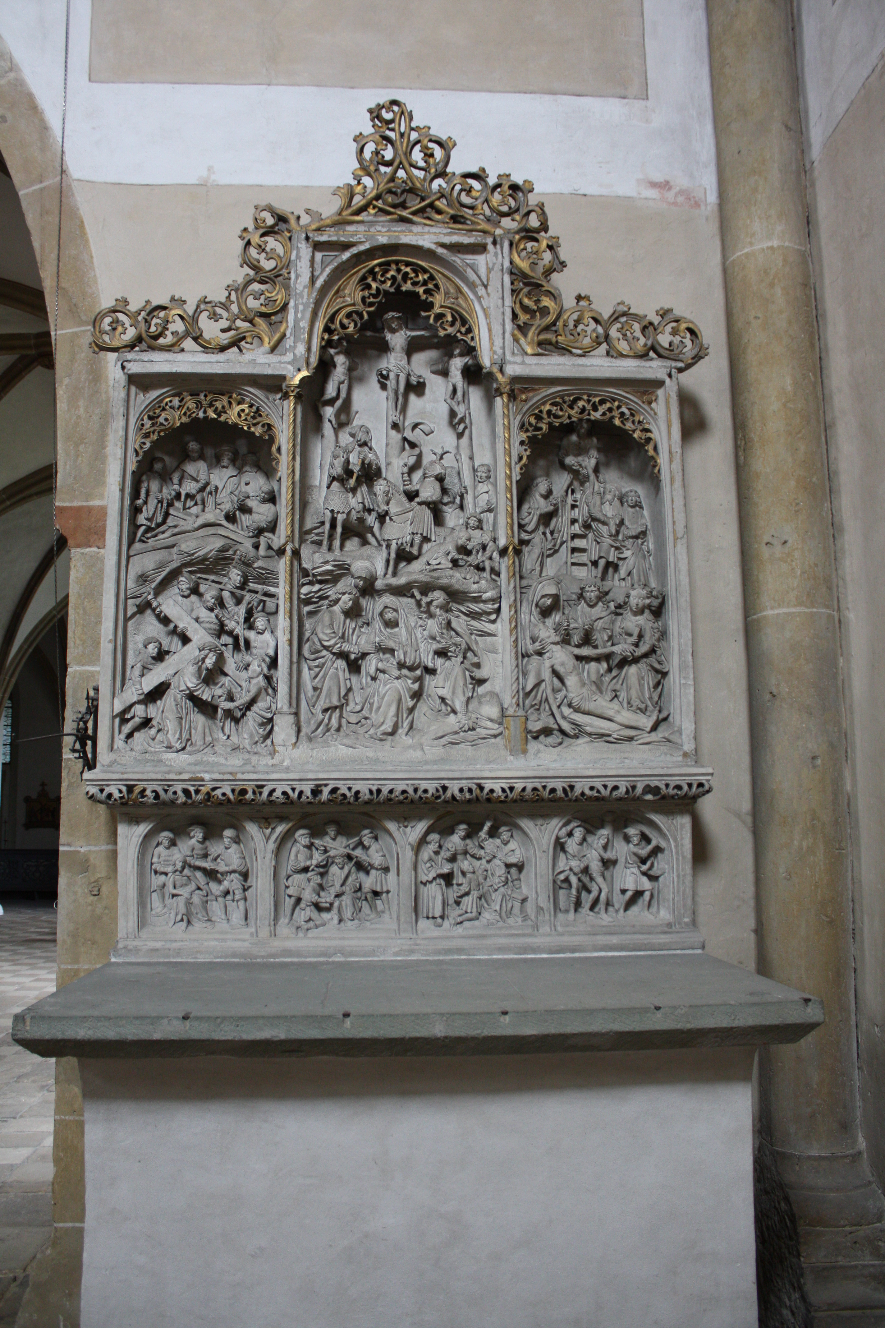 Passionsaltar im ehem. Kloster Marienfeld